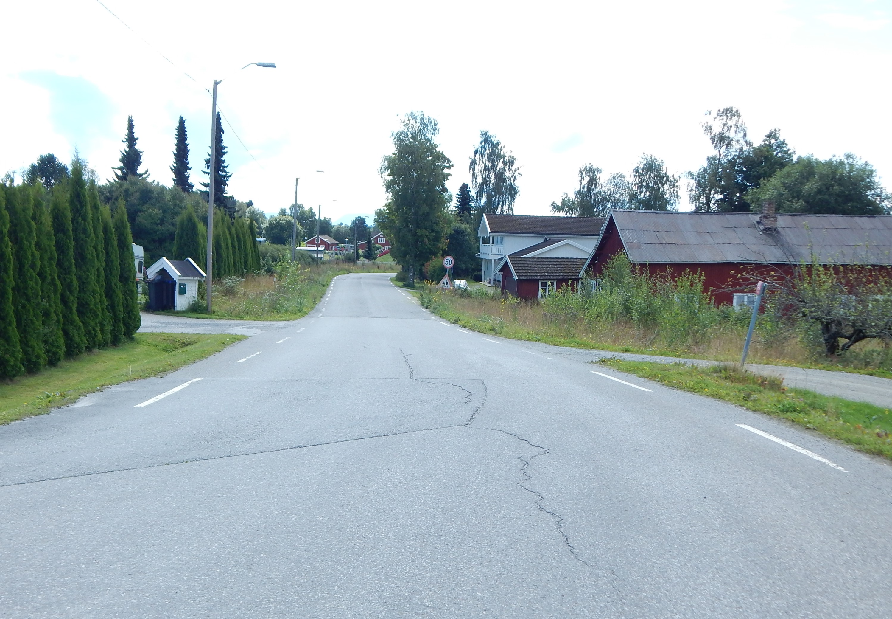 Retterstadvegen (fylkesvei 1704, tidl. FV39) nær Stavsjø